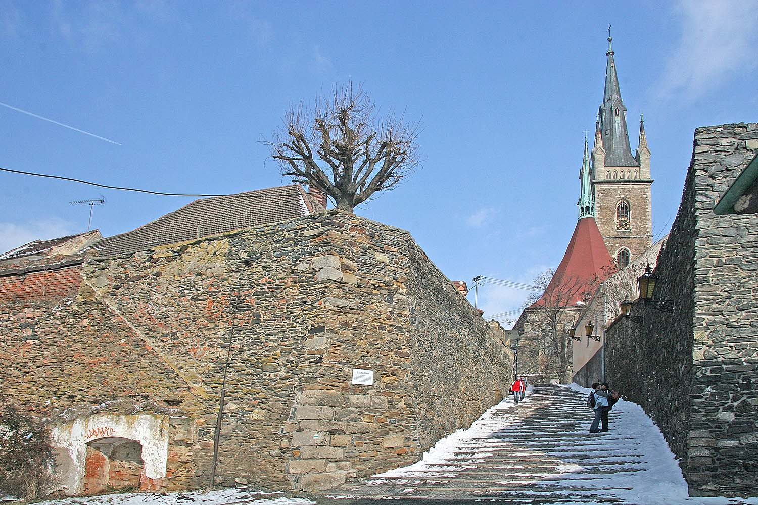 Zákoutí pod kostelem Svatého Petra a Pavla v Čáslavi autor: Prazak date: 13. 3. 2006